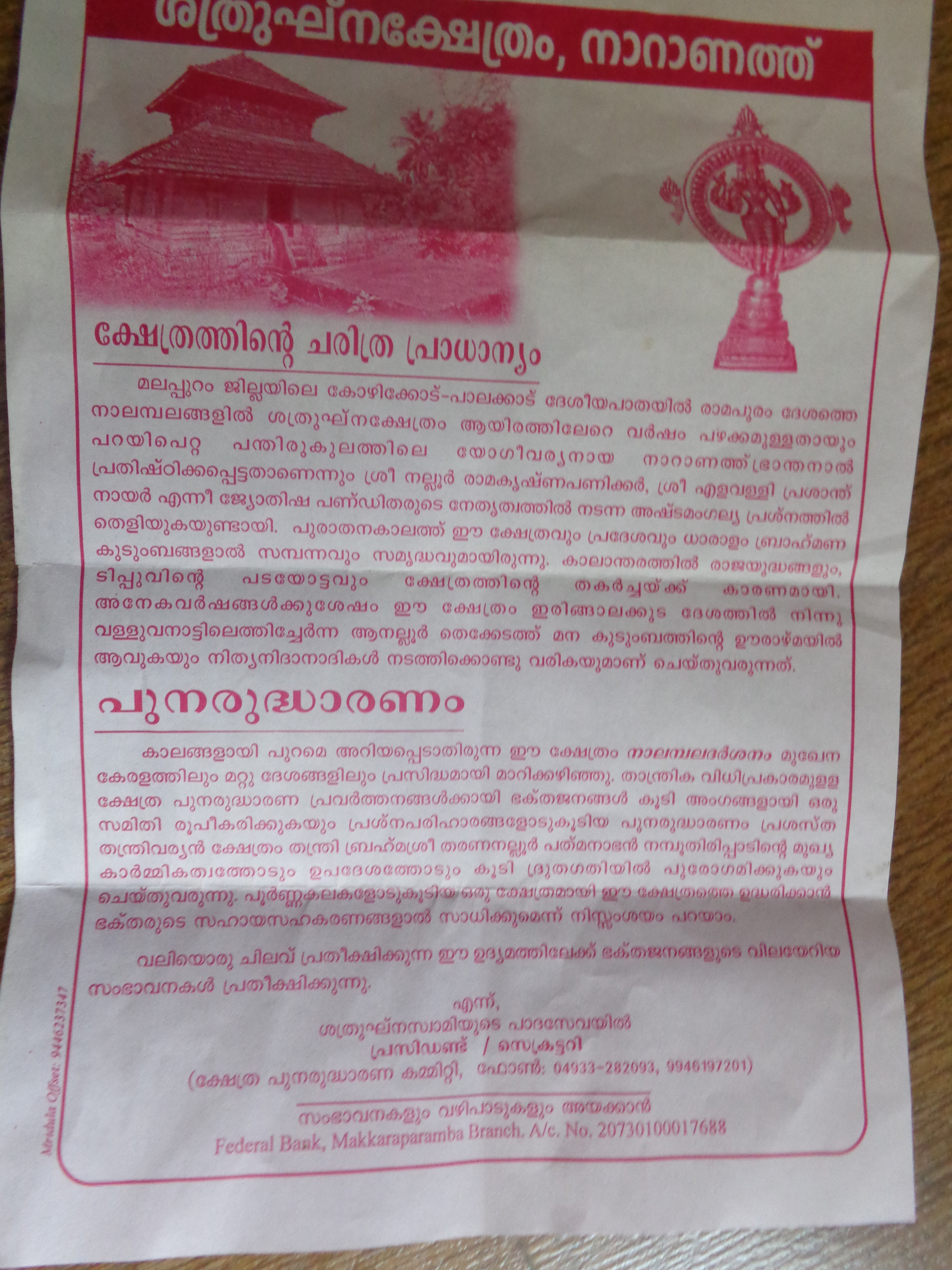 notice of naranath satrughna temple